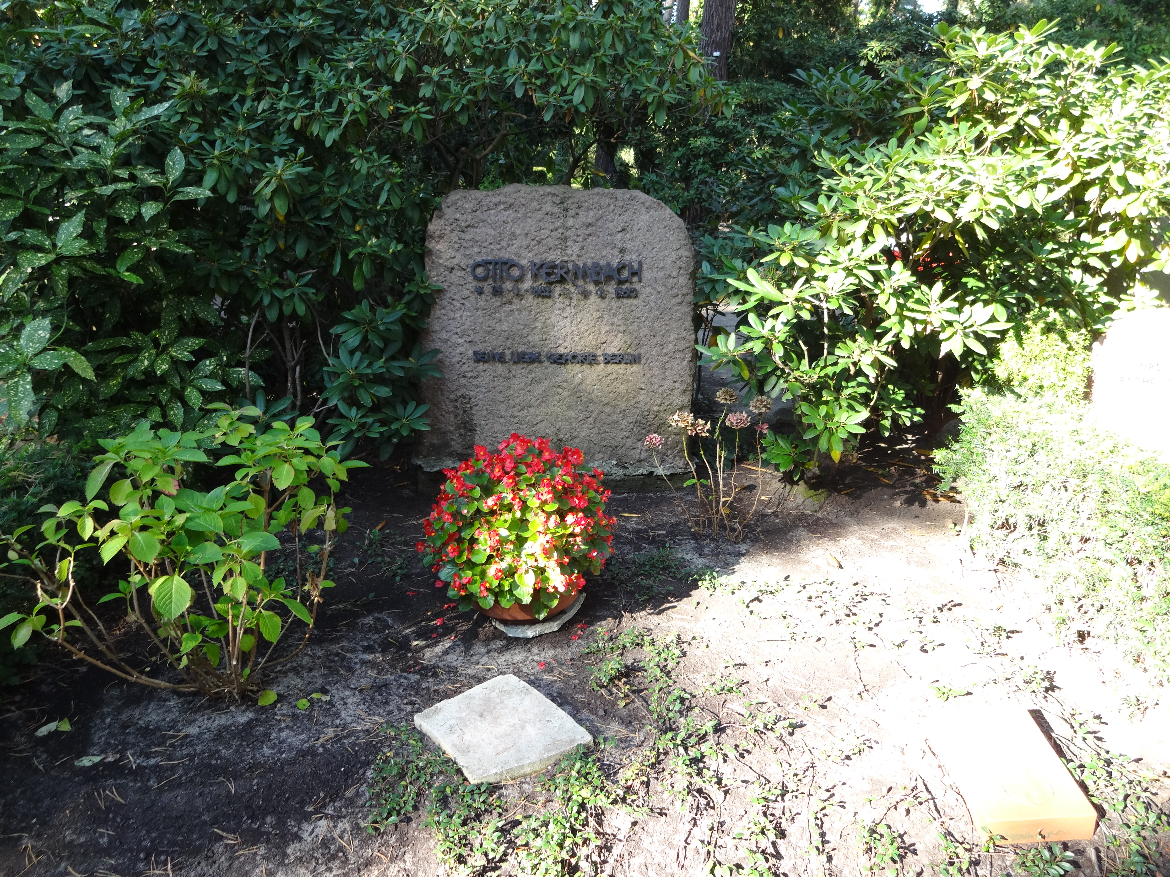 Ehrengrab von Kermbach, Otto auf dem Waldfriedhof Dahlem, der Friedhof ist als Gartendenkmal der Stadt Berlin (Nr. 09045949) This is a photograph of an architectural monument.